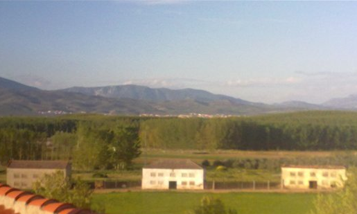 Chozones en la vega granadina junto a la localidad de Láchar (Granada, España). Recorte de una foto hecha por mí.